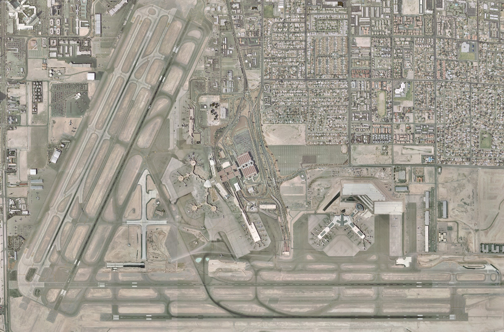 nasa world wind 1.3.5